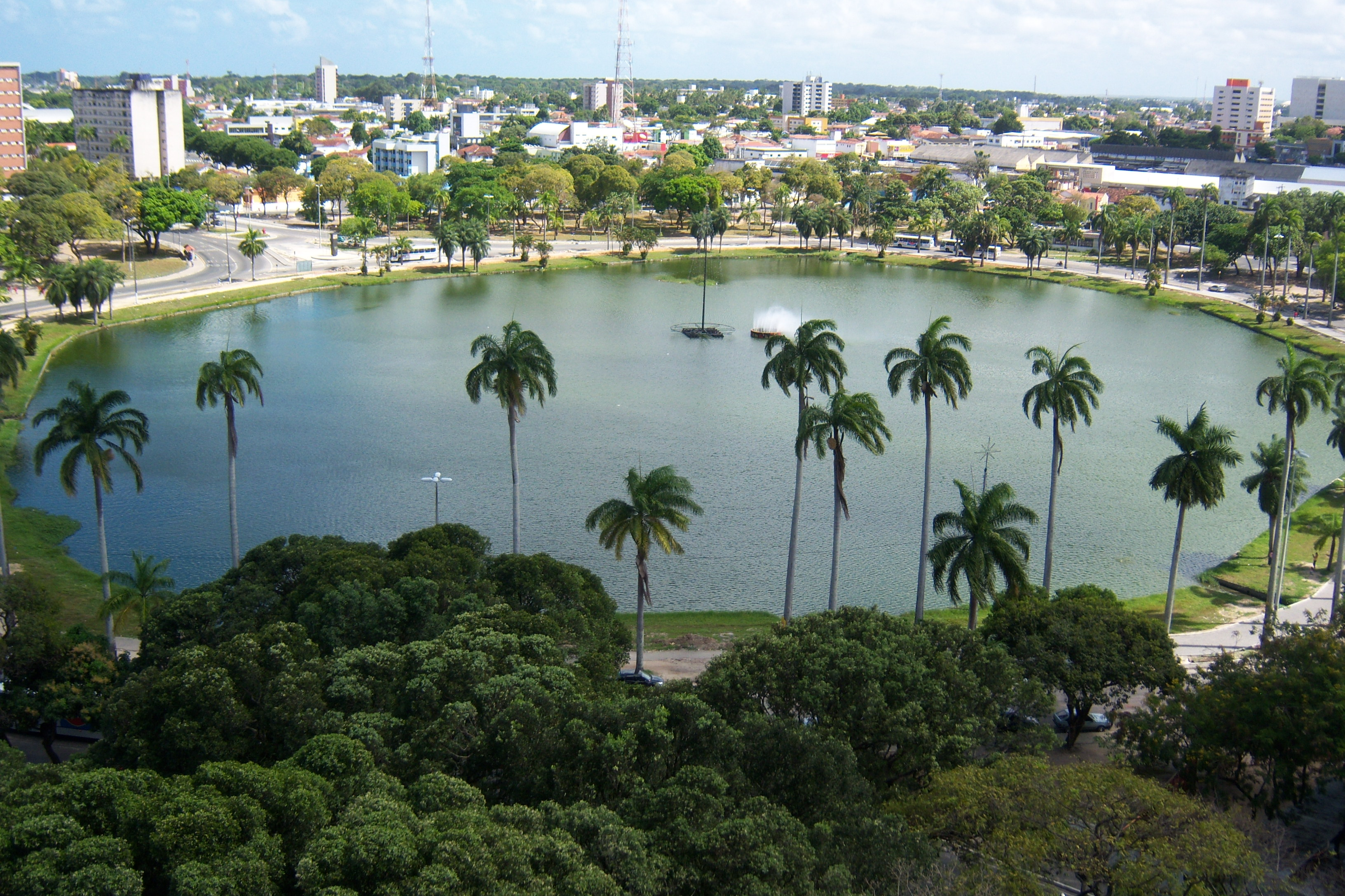 Parque Sólon de Lucena (lagoa)_12° andar